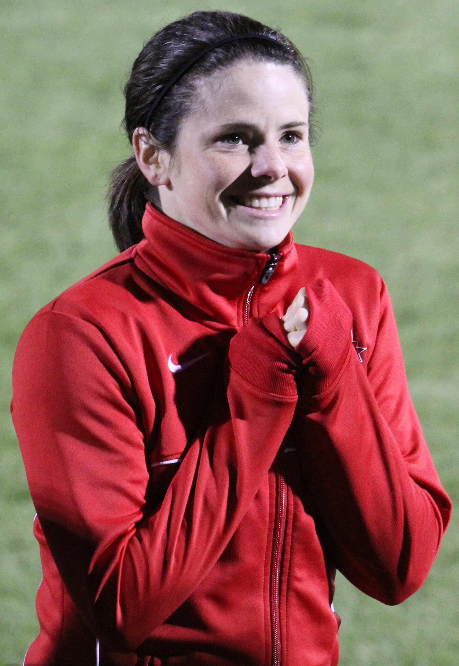 2013-04-20 Spirit - Flash-56